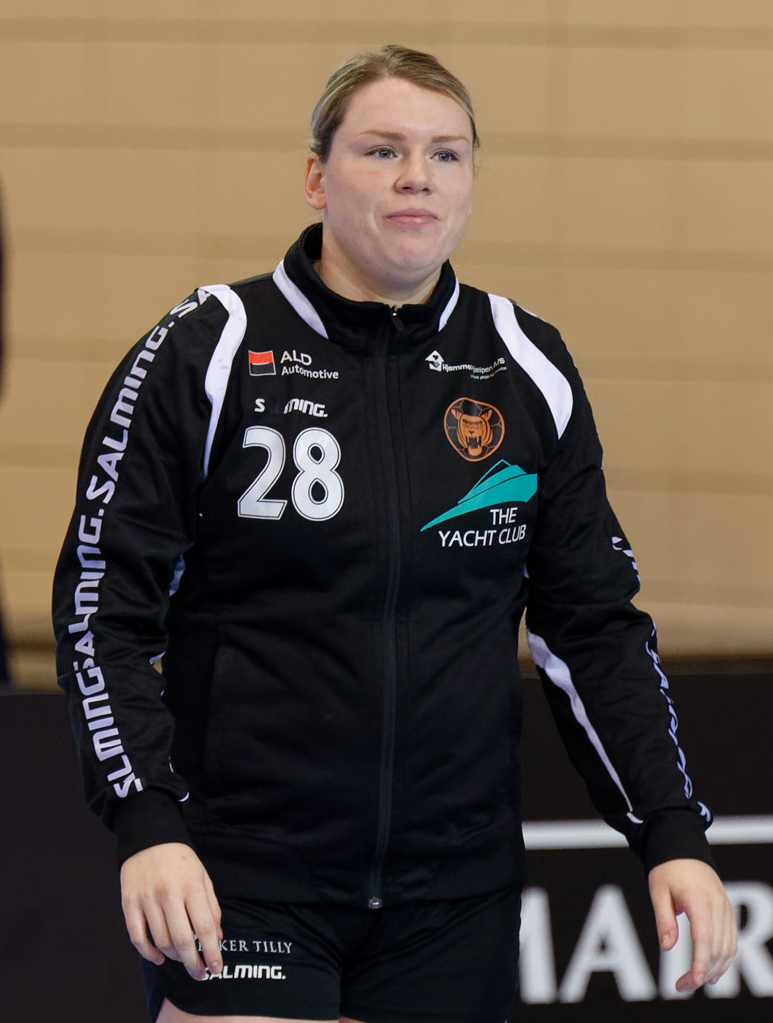 Rencontre de coupe EHF entre Issy Paris Hand et les danoises de Copenhague. A Issy-les-Moulineaux, le 28 janvier 2018.